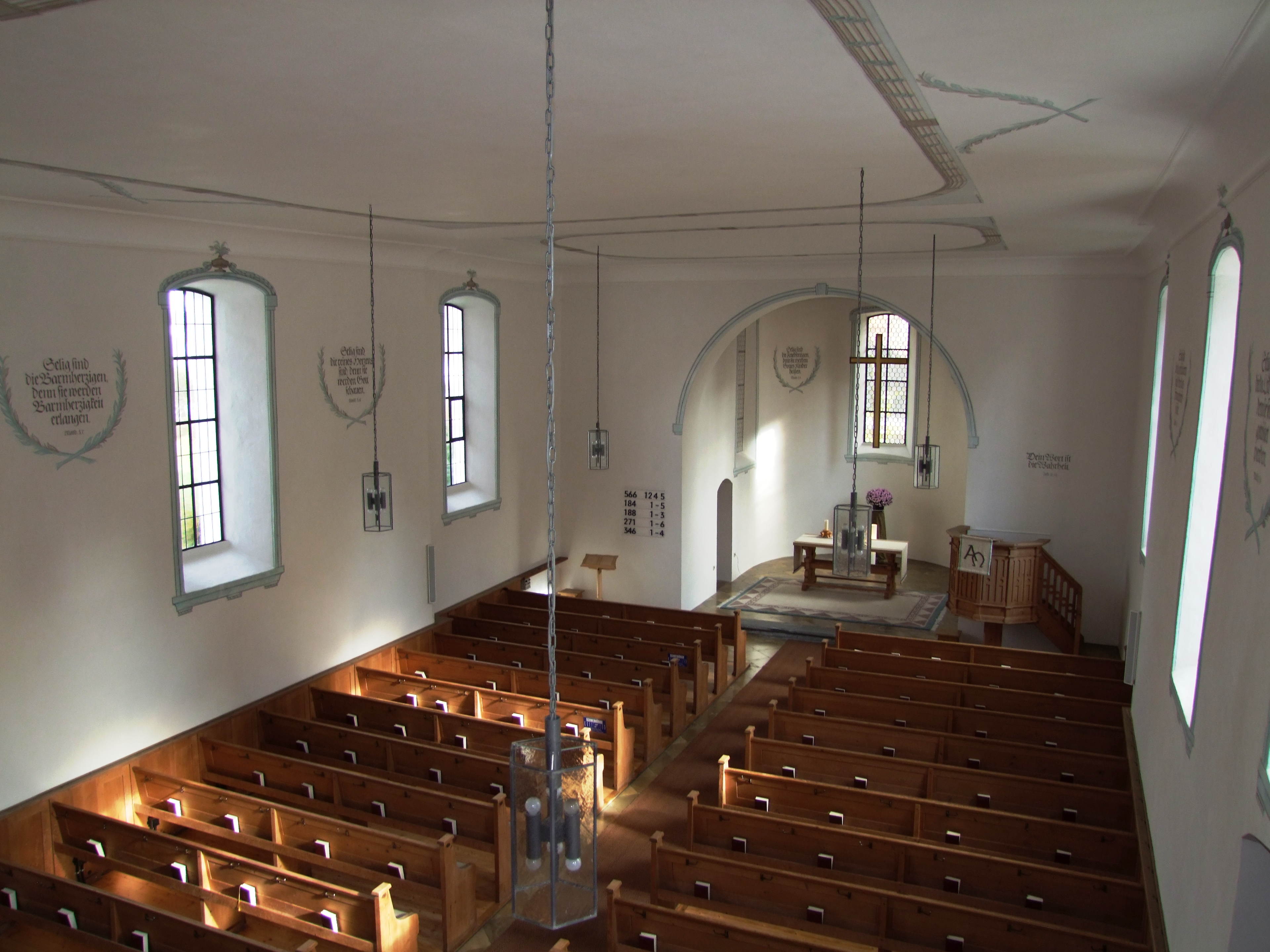 Evangelisch-reformierte Kirche, ehemalige Spitalkirche in Bad Grönenbach.